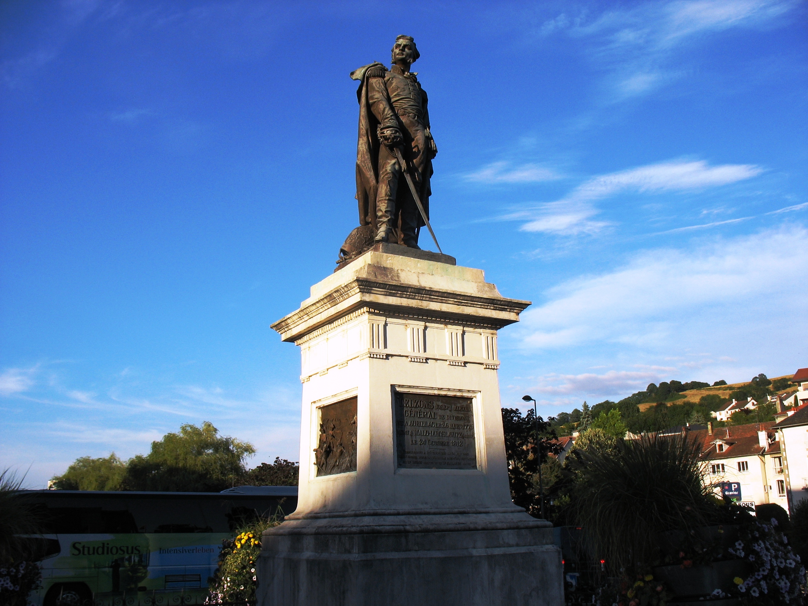 Пямятник Дельзону в Орийяке